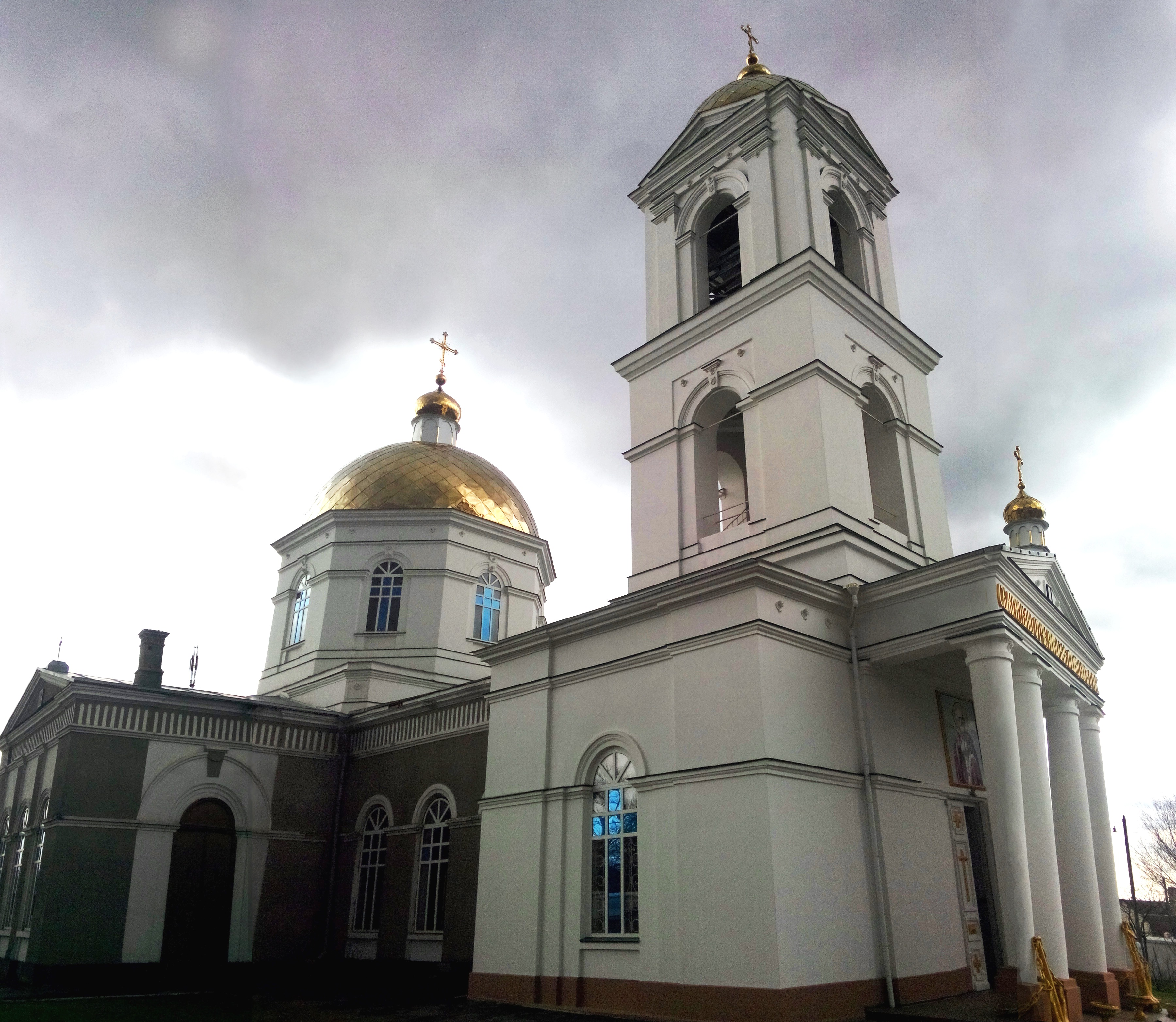 Херсон